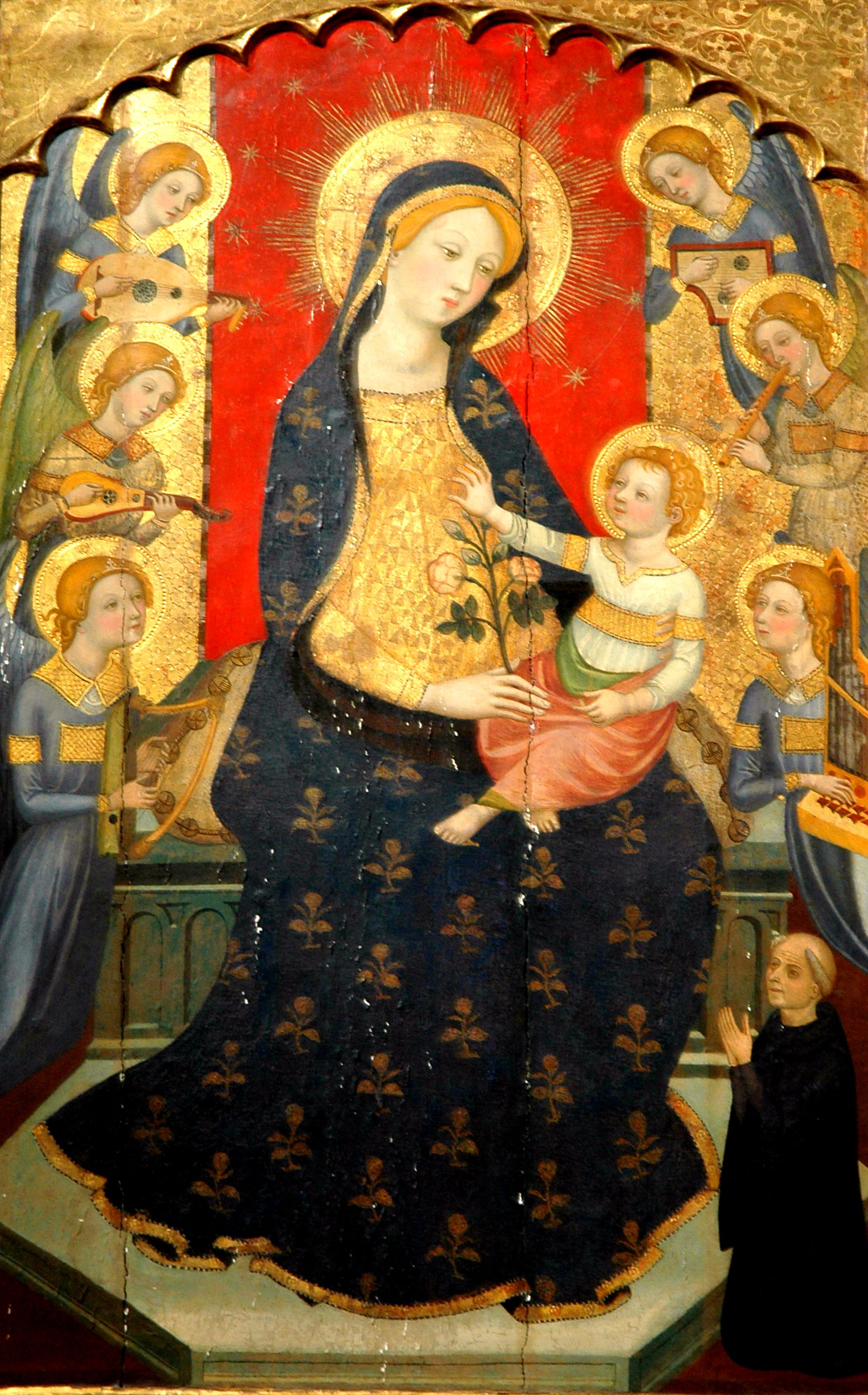 Monestir de Sant Cugat - Retaule de Pere Serra - Verge